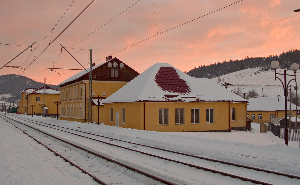 Станція Лавочне